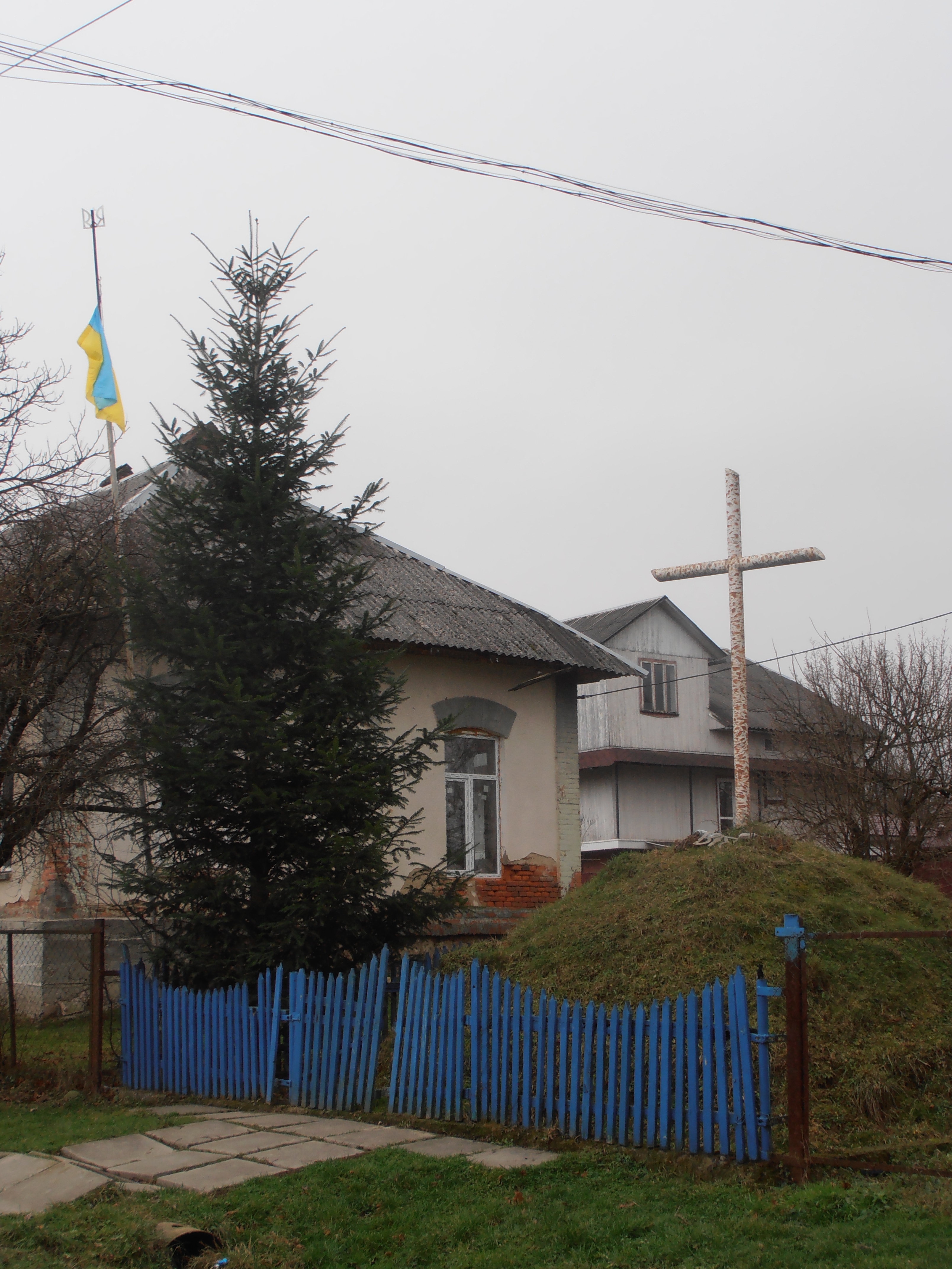 Символічна могила героям, що полягли за волю України